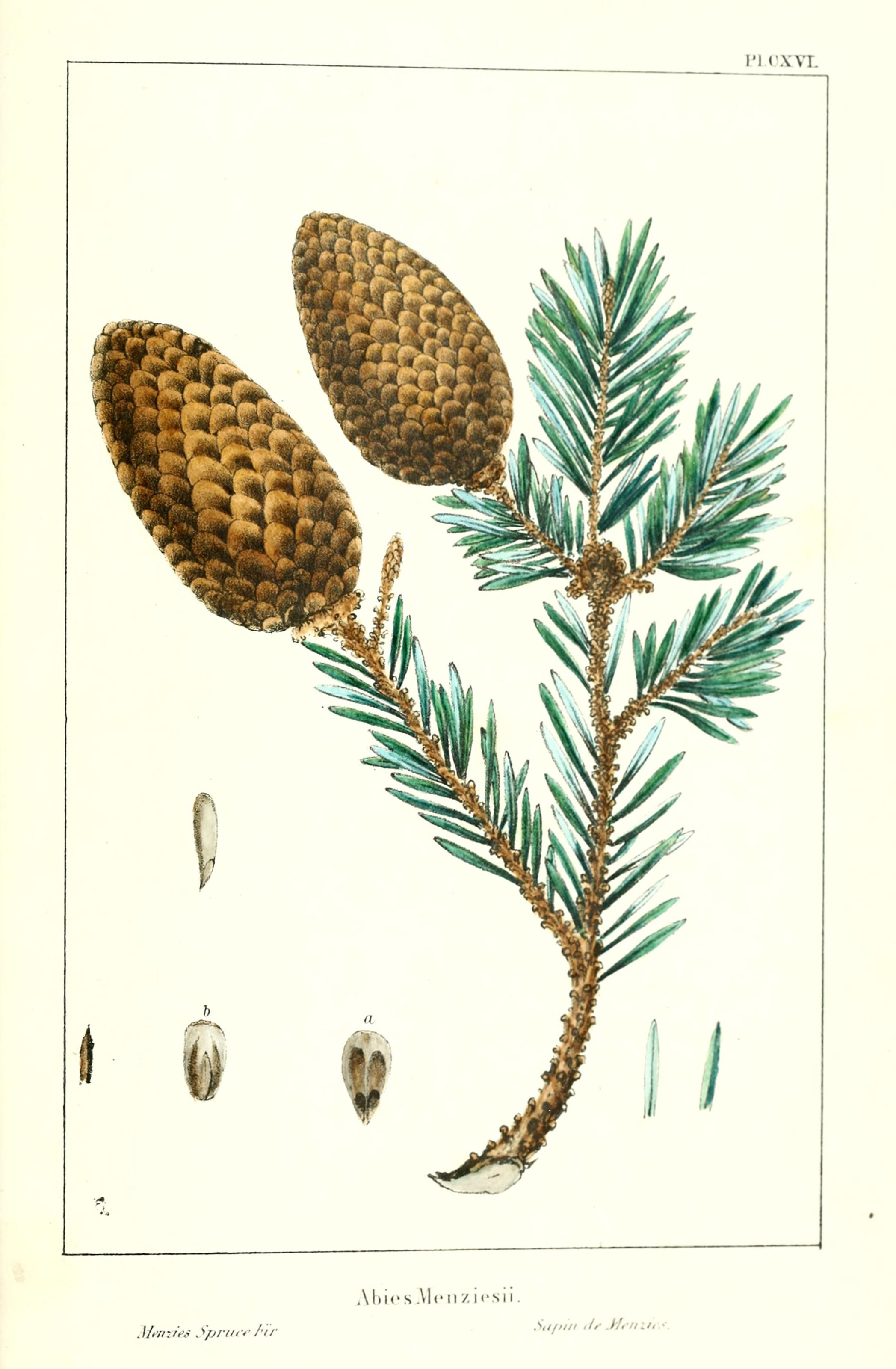 l'\ CXVT. Mt'iizifS . "^pr/'i-t- /•//■ .\l)i.'S Alcii/ii'sii \i/iiii ill- .Htiiiu.